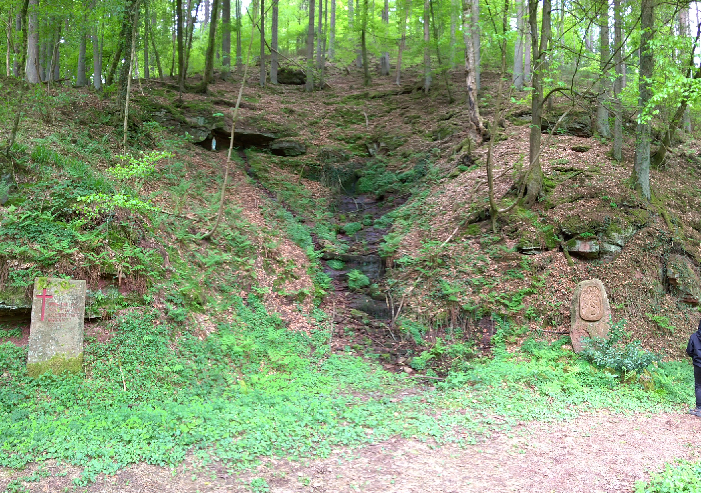 Der Maria Hilf Bildstock an einer kleinen Quelle unterhalb der Schreckemühle im Haslochtal mit Marienstatue am Quellaustritt und christlichem Gedenkstein.